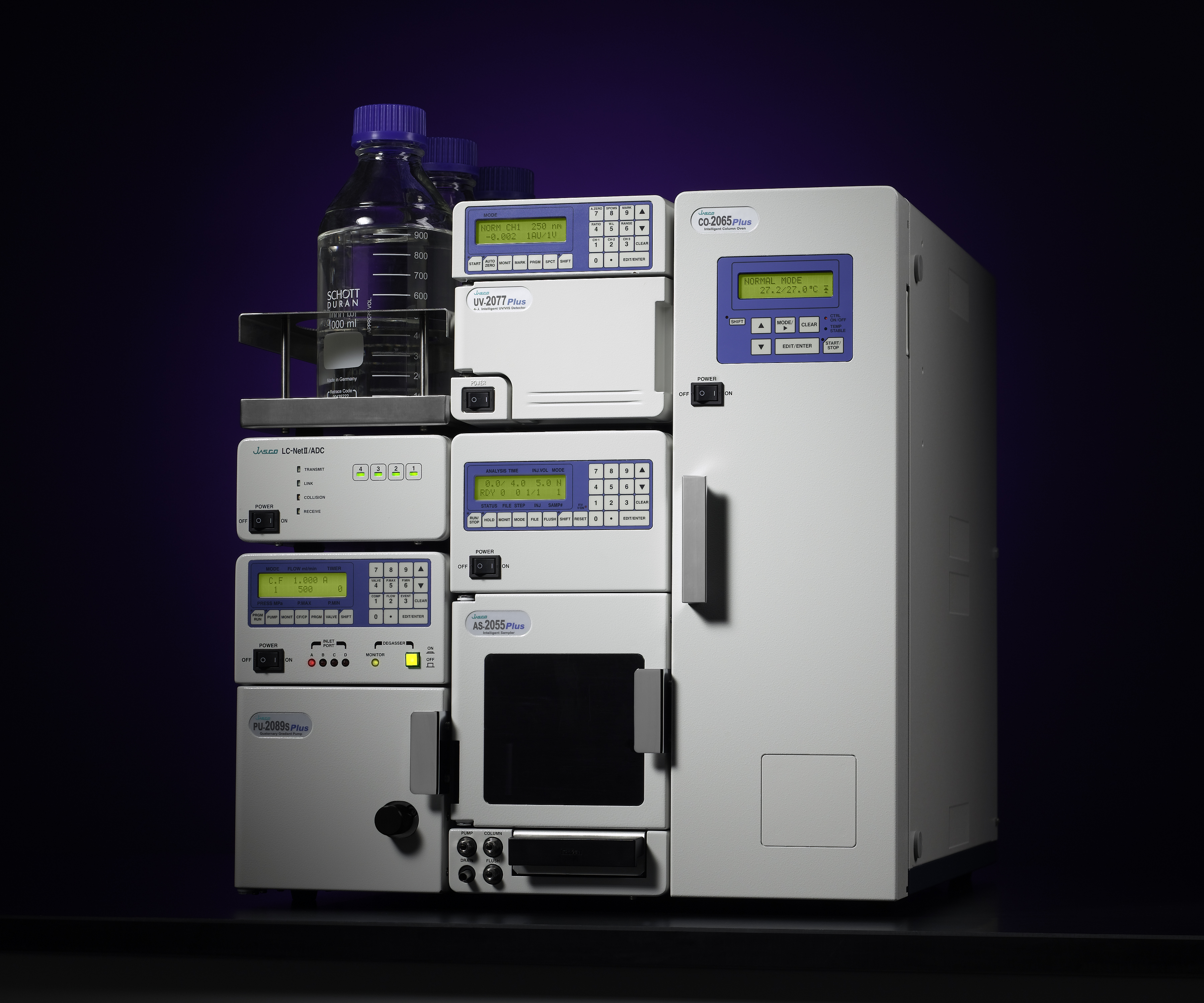 Cromatógrafo Líquido JASCO Brasil